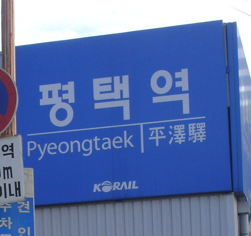 평택역 간판